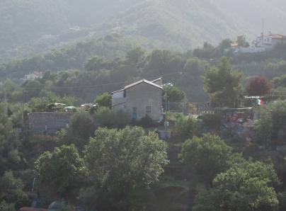 Casa de la familia de Cristóbal Colón en Savona